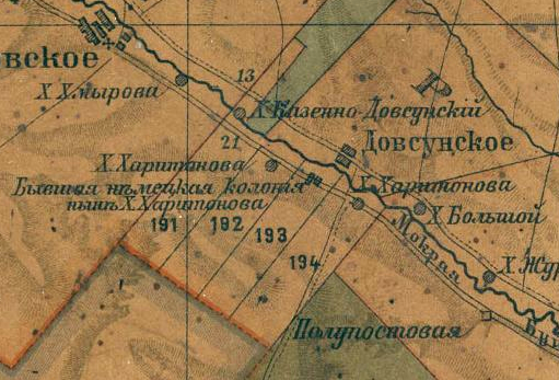 Село Довсунское на «Карте Ставропольской губернии составленной при ставропольской губернской чертёжной по новым сведениям по указаниям и под непосредственным наблюдением ставропольского губернатора, генерал-майора Н. Е. Никифораки в 1896 году»